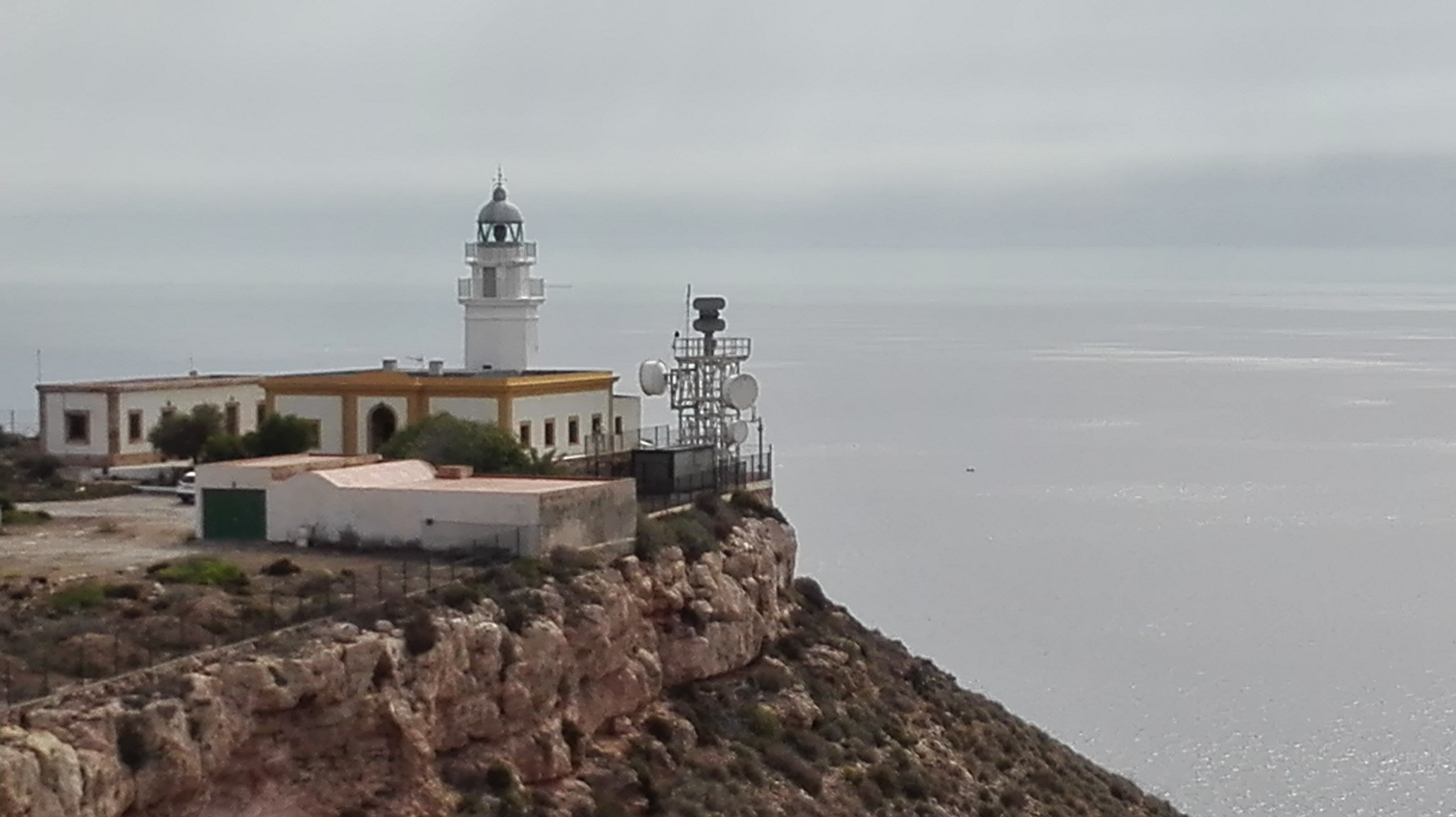 Leuchturm am Mesa Roldán, Carboneras, Almería, Spanien